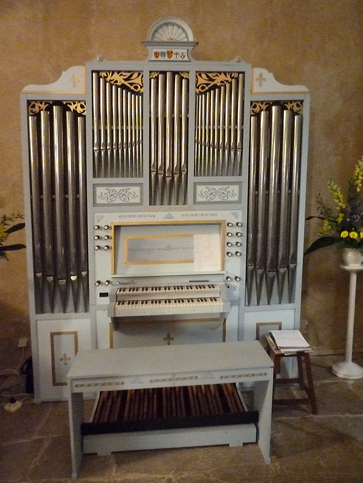 orgue installé en juin 2011 dans l'église de Robion